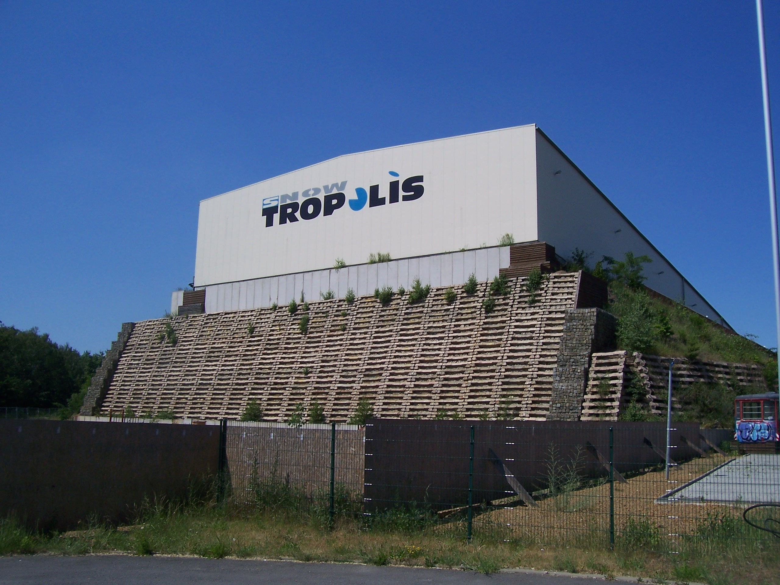 SnowTropolis Skihalle in Senftenberg